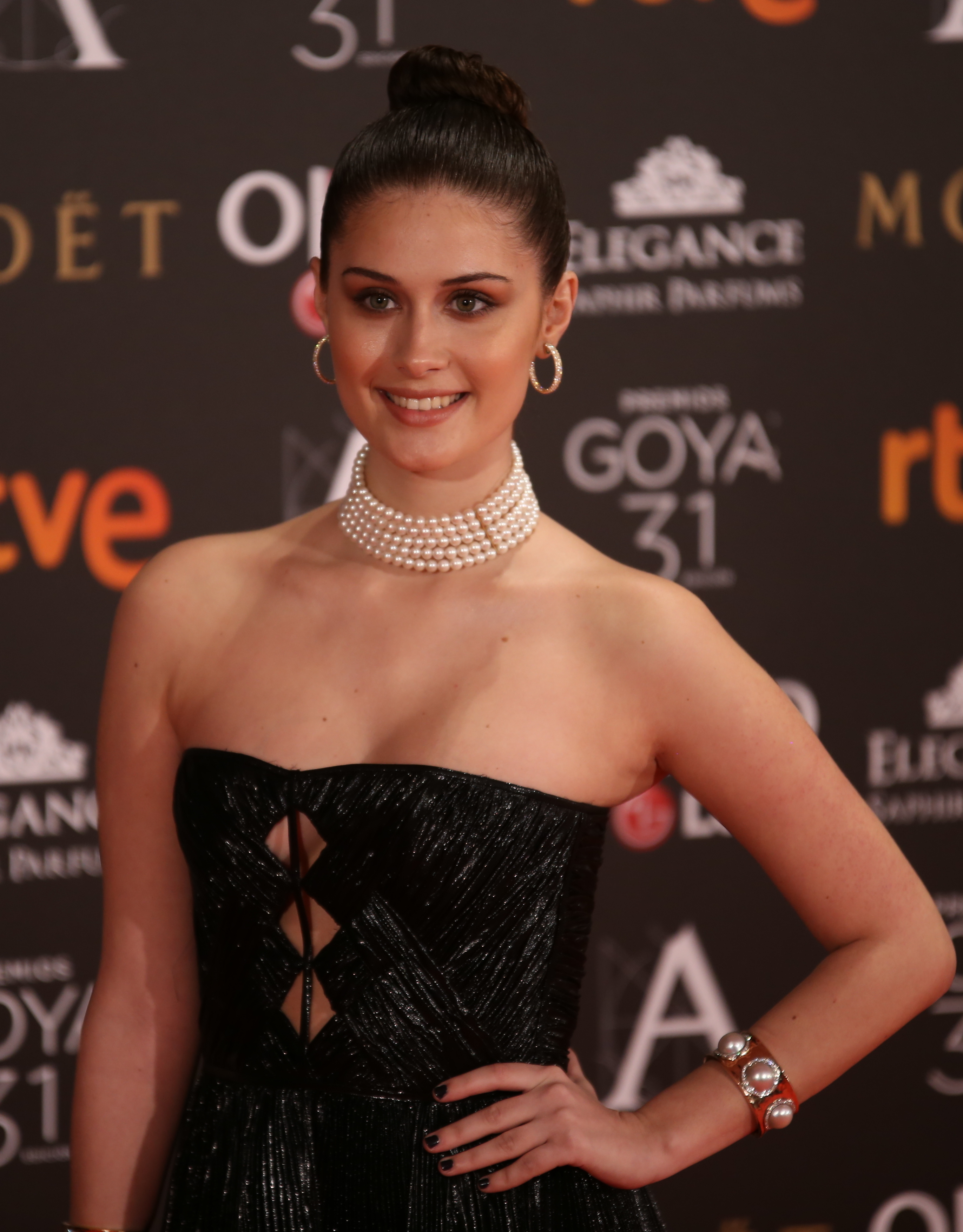 Premios Goya 2017